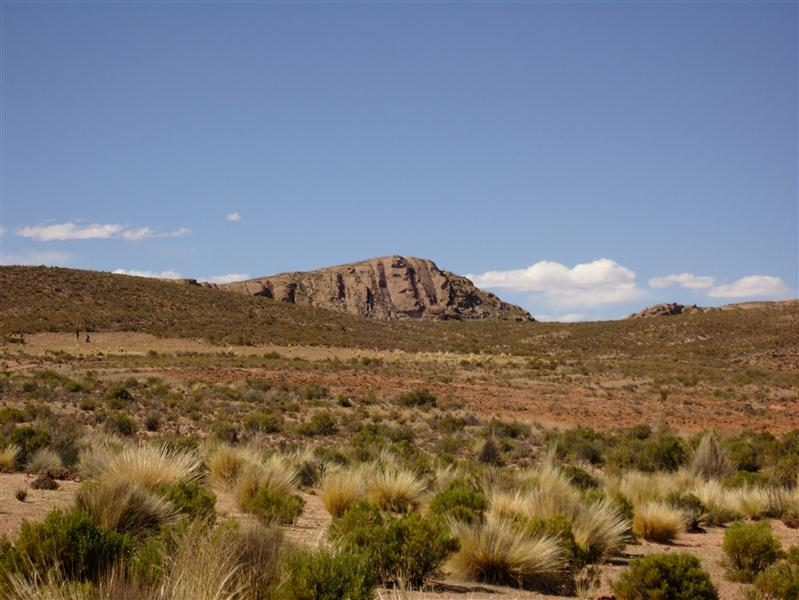 Formaciones Rocosas en el Altiplano boliviano